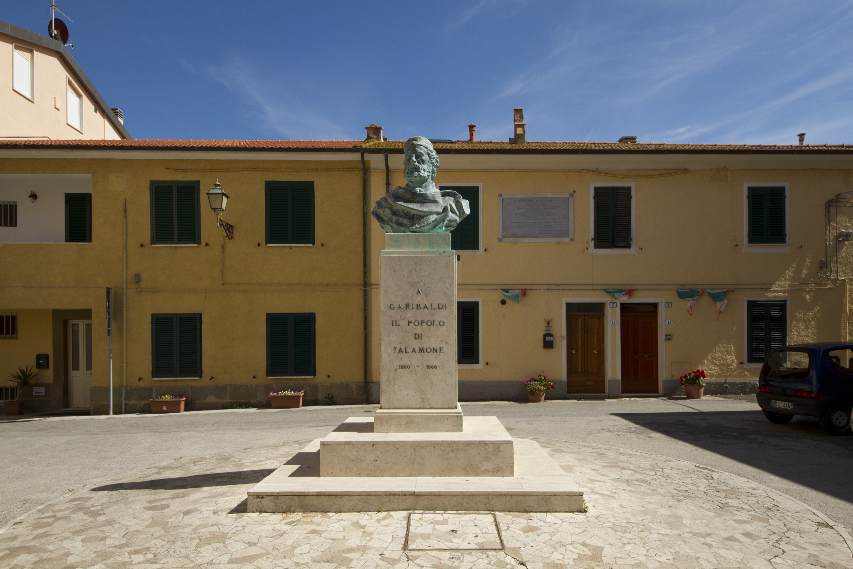 Guiseppe Garibaldi, Talamone, Grosseto, Italy